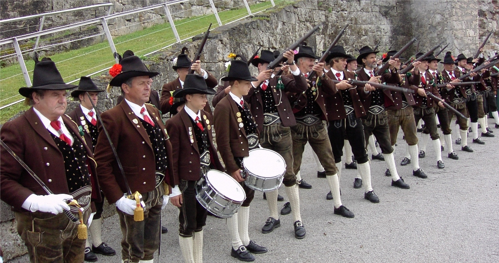 Thierberger Schützen des Bundes der Tiroler Schützenkompanien (Viertel Unterland - Bataillon Kufstein) beim Abfeuern einer Ehrensalve. Fotograf: Benutzer:Henryart